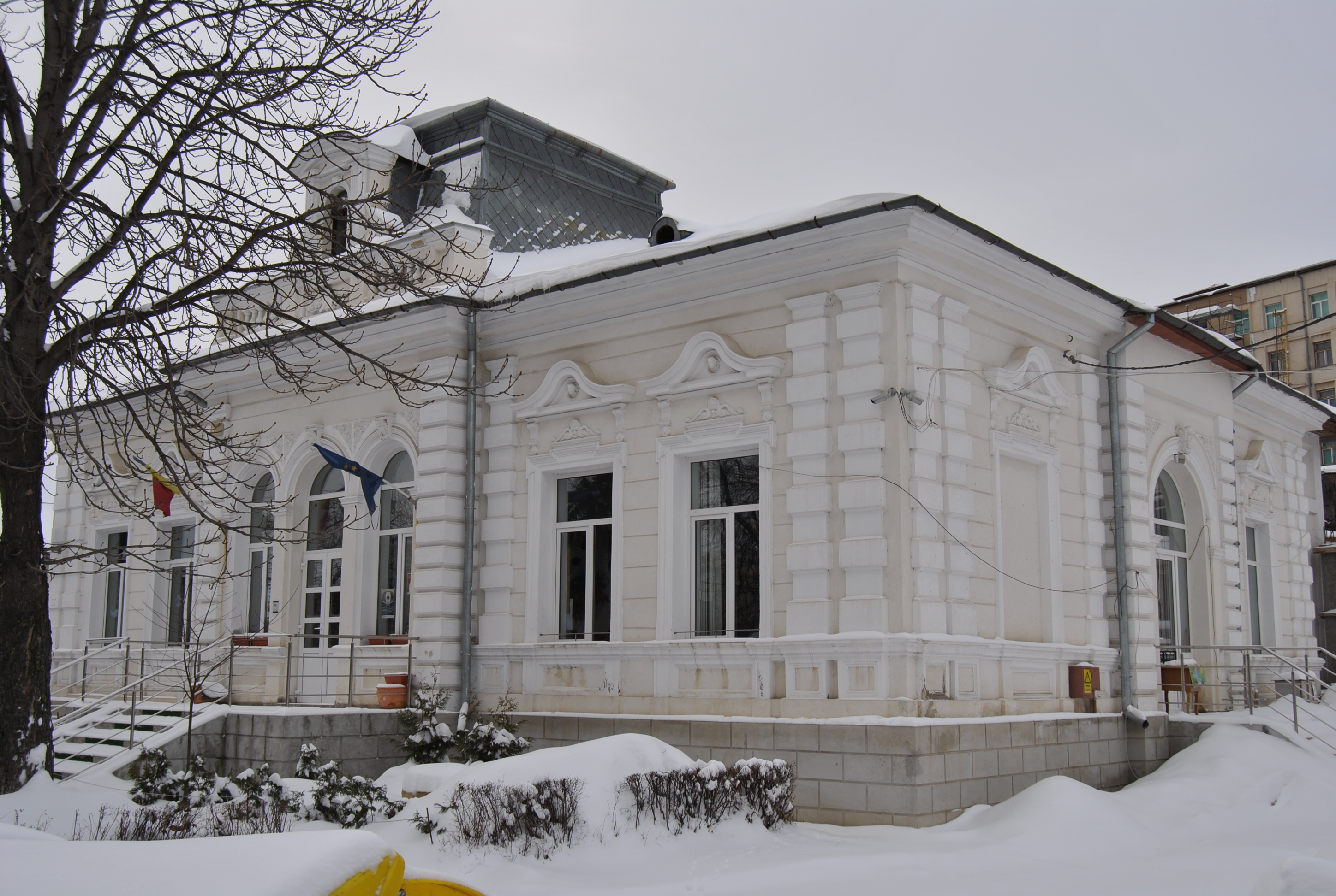 Casă - acum Grădiniţa sf. Sava